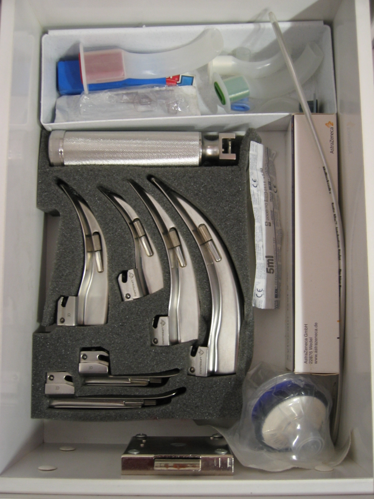 Intubationsbesteck aus einem Rettungswagen Quelle: Fotografiert am 16.02.2005 Fotograf: Philipp Lensing